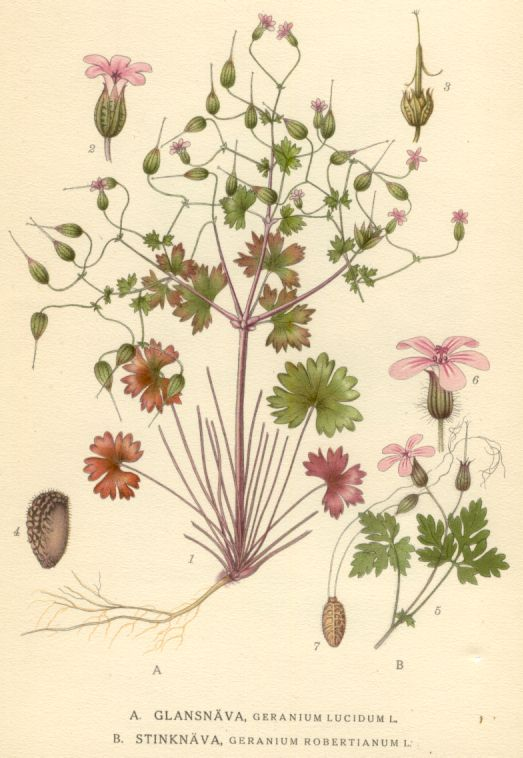 A: Geranium lucidum B: Geranium robertianum